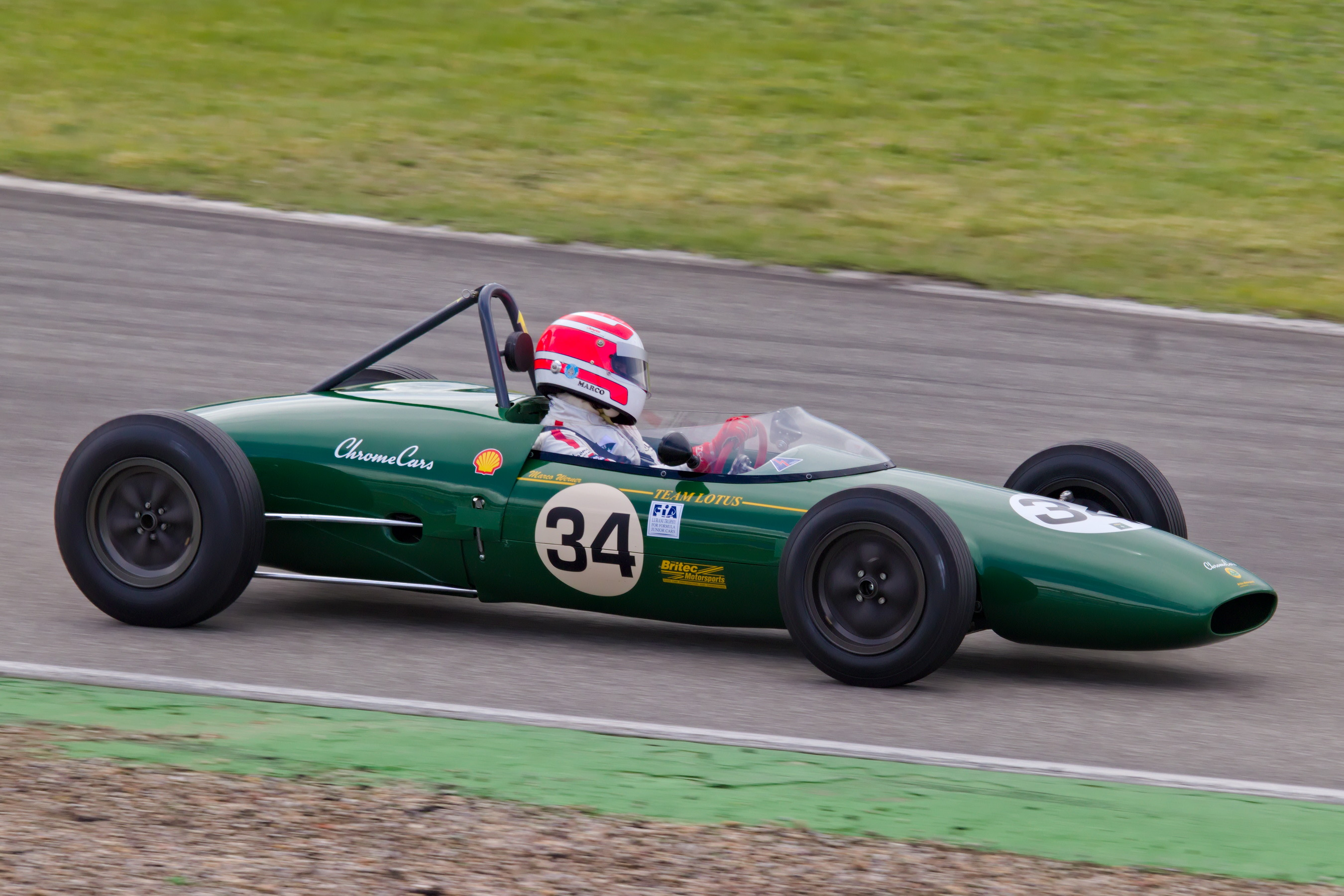 Marco Werner beim zweiten Rennen der FIA Lurani Trophy auf dem Hockenheimring 2019 im Lotus 22